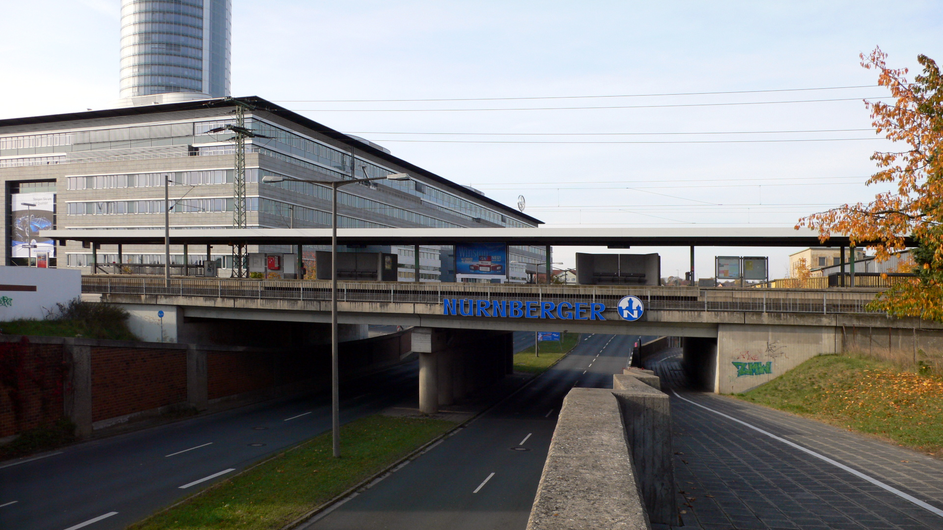 Haltepunkt Nürnberg-Ostring, Lage des Haltepunkts auf der Überführung über die Cheruskerstraße (B 4 R, Ostring)